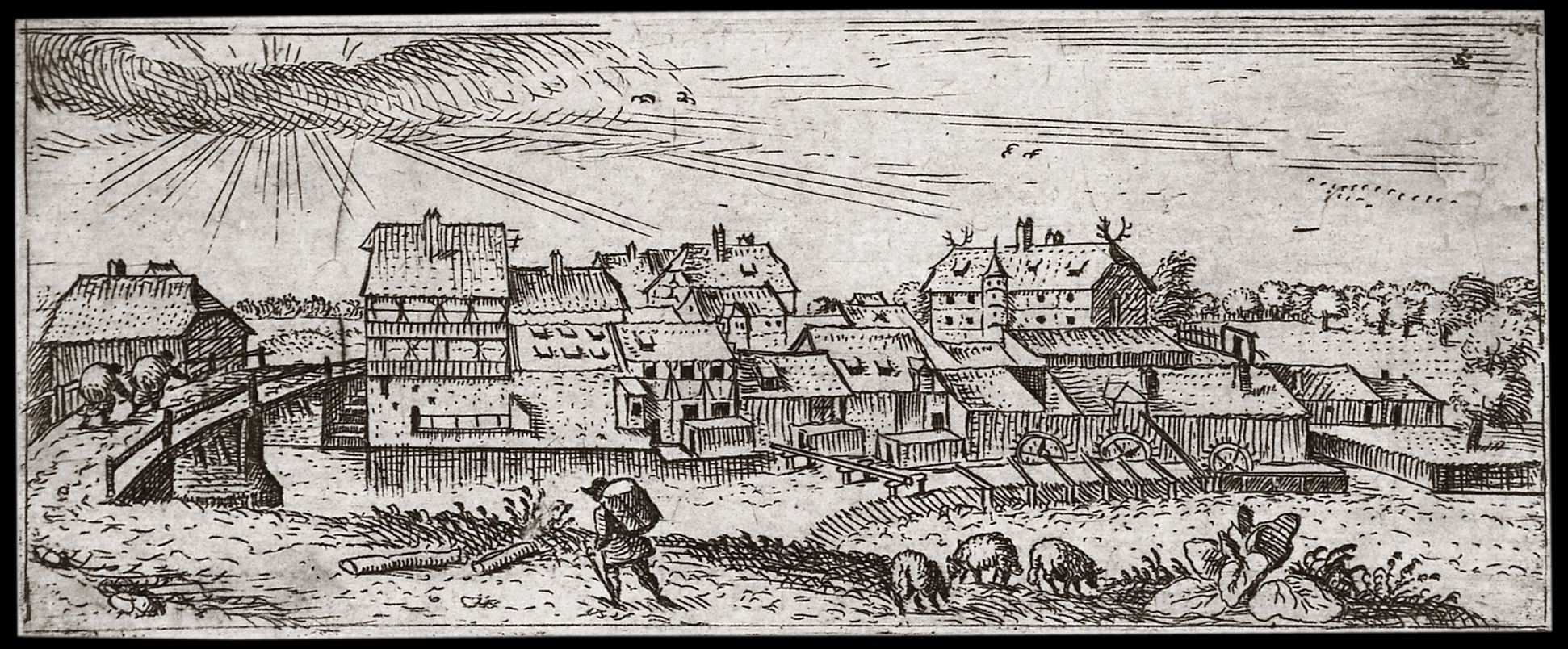 Stich - Stein bei Nürnberg